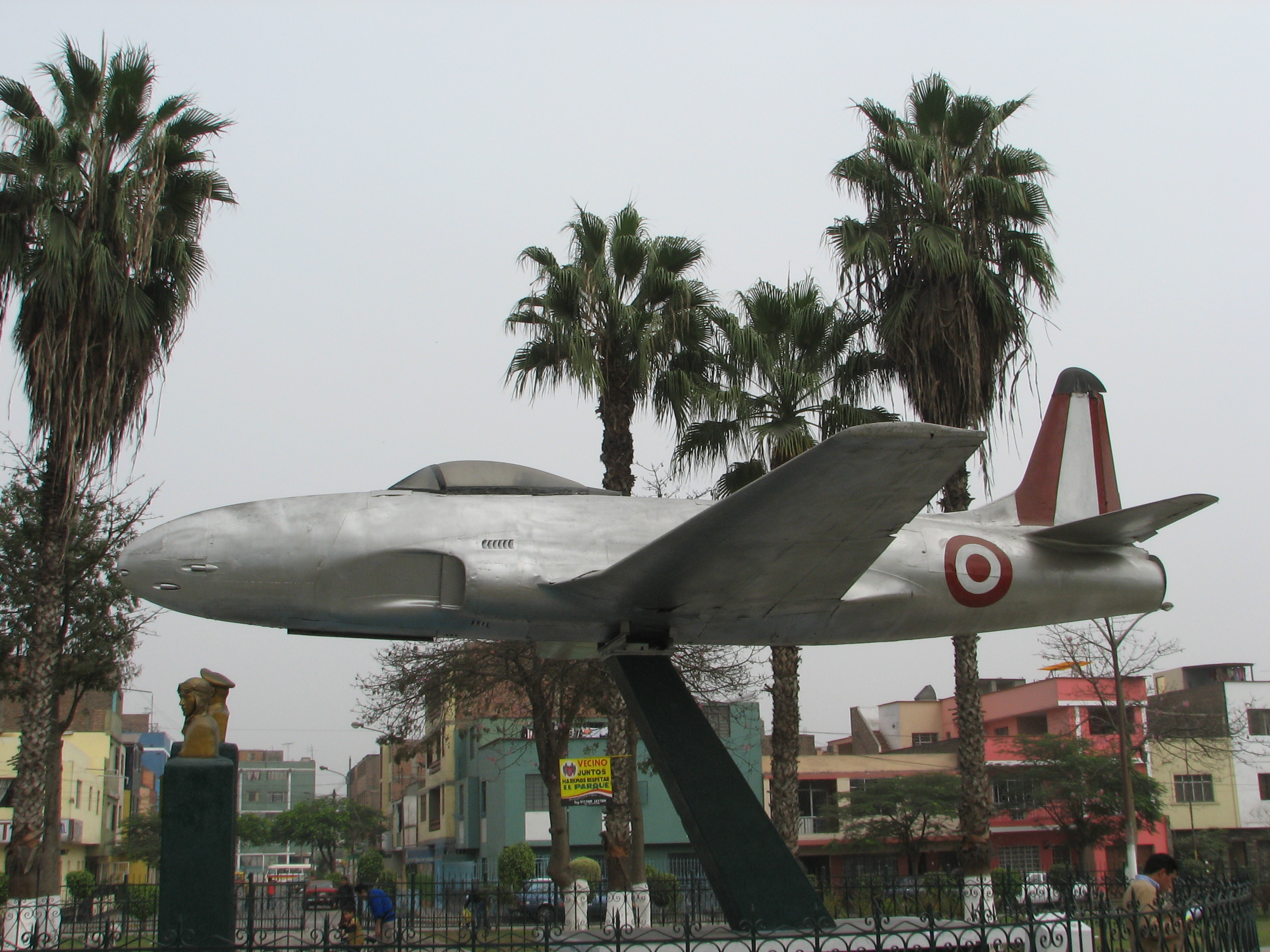 Aircraft F-80C Shooting Star (154) in Parque del Avión Rímac/Lima, Peru.jpg